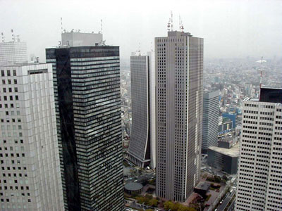 西新宿超高樓群 東京西zh:新宿地區的超高樓群一景，本照片是由zh:東京都廳第一行政大樓頂樓的瞭望室俯視而出。 本圖片由上傳者zh:User:SElephant拍攝於2000年4月。